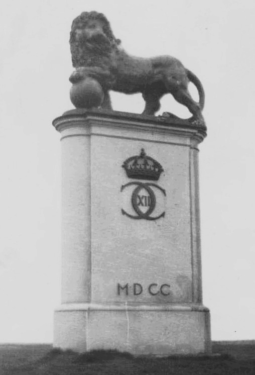 Narvalejonet